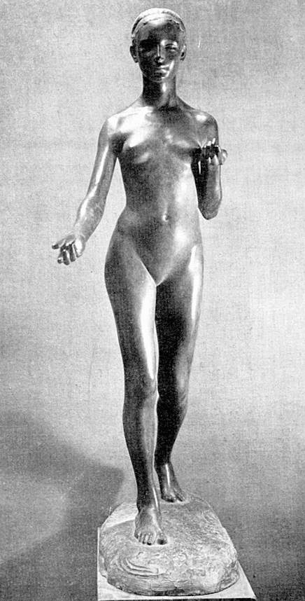 Young girl